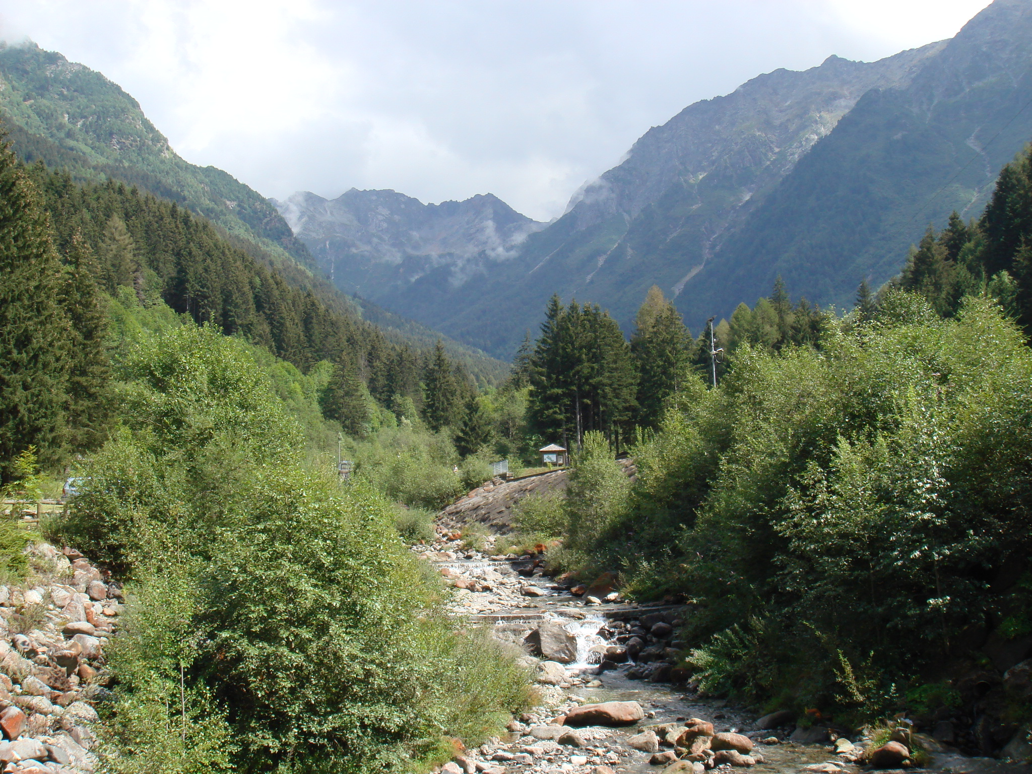 Rino di Sonico: Frazione del Comune di Sonico in Provincia di Brescia. Torrente Remulo in Val Malga. Foto di Stefano Bolognini 14 agosto 2007.